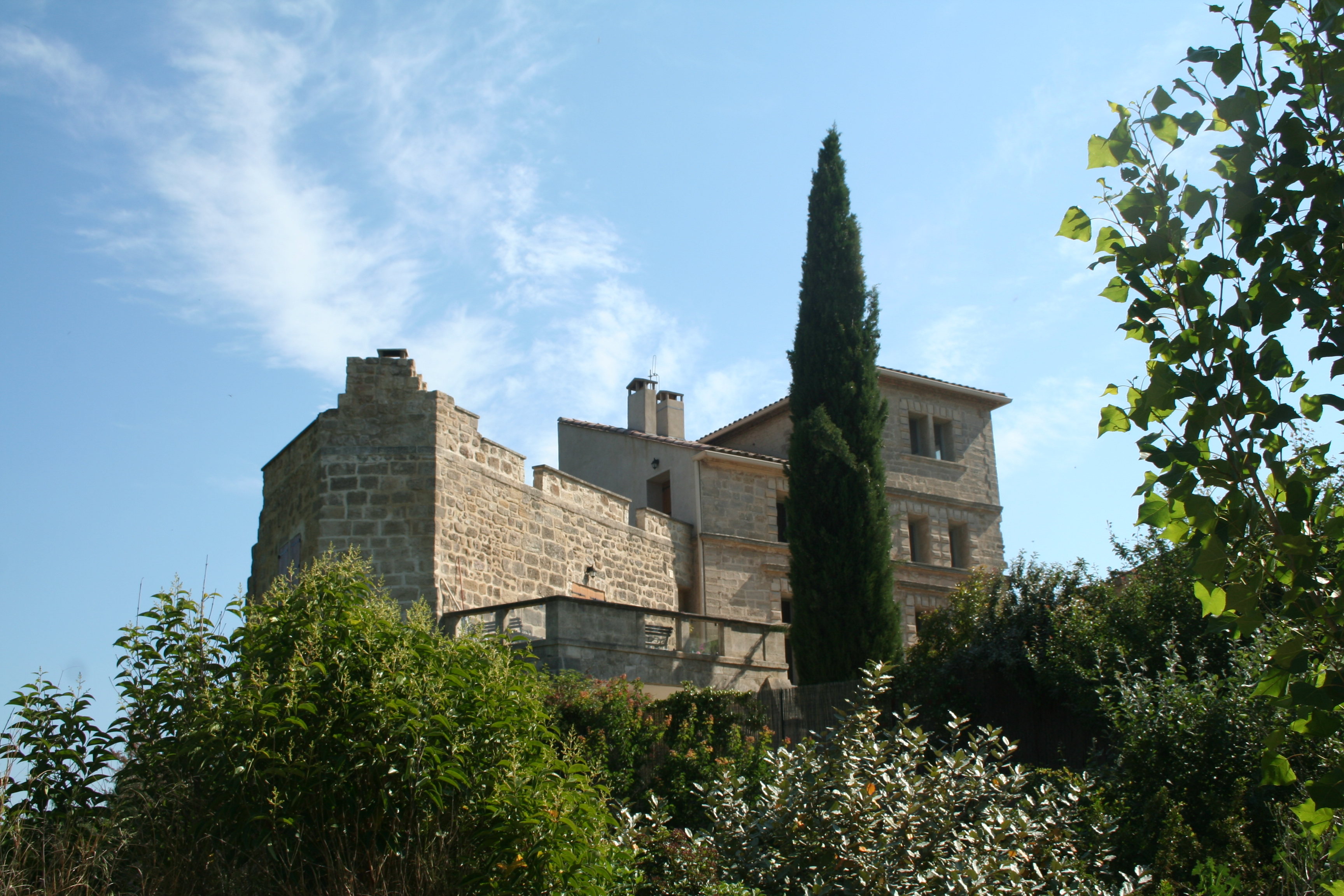 Bélarga (Hérault) - château